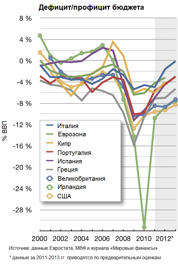 Дефицит/профицит бюджетов стран долгового кризиса: Италии, Кипра, Португалии, Испании, Греции, Великобритании, Великобритании и Ирландии по сравнению со средним значением по еврозоне и по сравнению с США (2000-2013). Данные за 2001-2010 гг. приводятся по данным Евростата ( Прогнозы на 2011-2013 гг. приводятся по данным МВФ ( и журнала "Мировые финансы"( (на декабрь 2011 г. - прогноз ОЭСР).